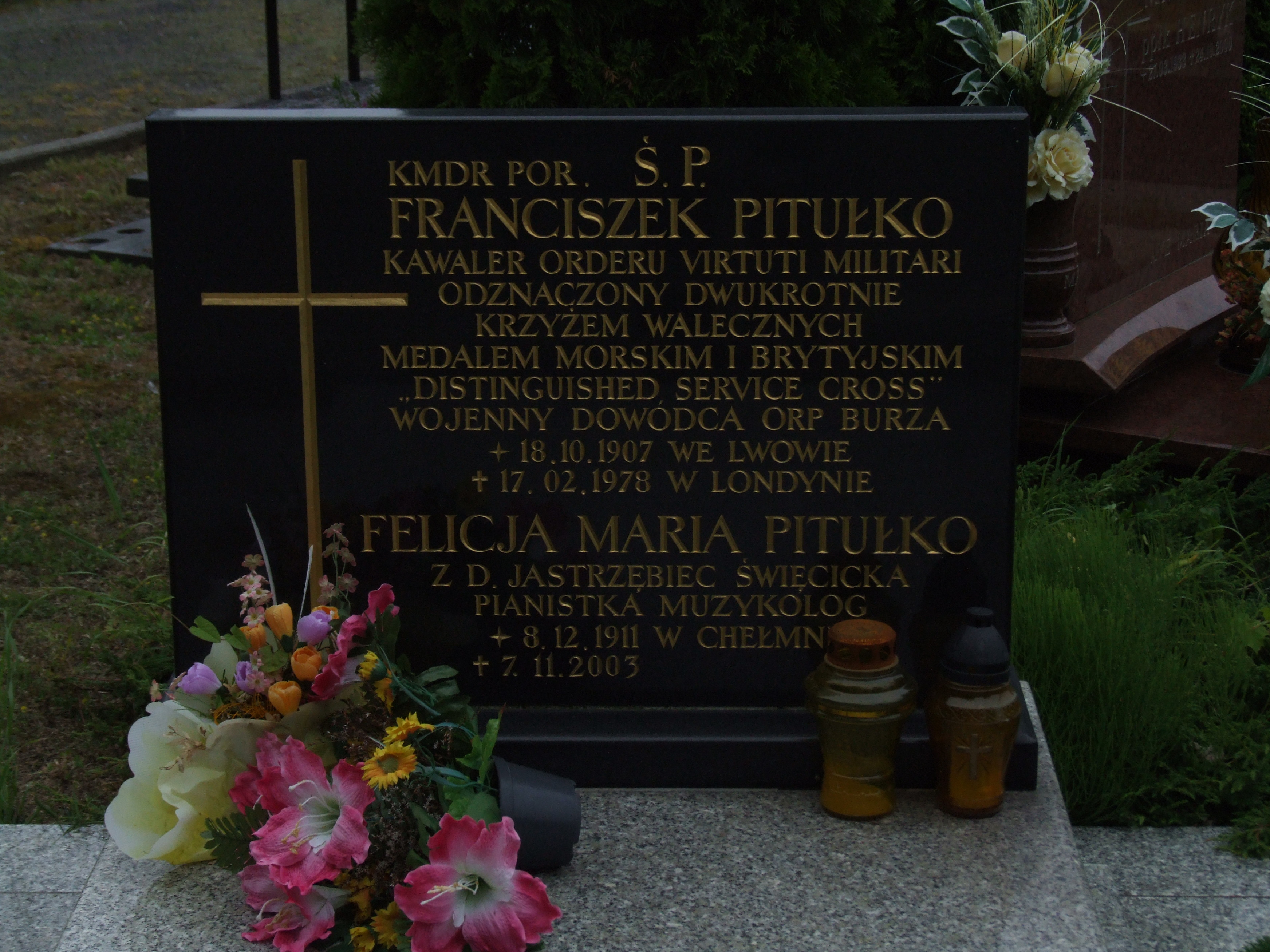 Gdynia-Oksywie Cmentarz Marynarki Wojennej